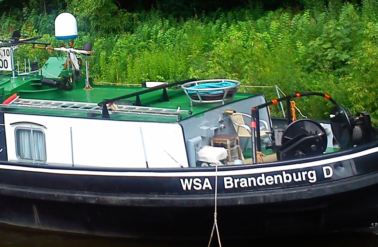 Details des Schleppgeschirrs auf dem Eisbrecher Seeadler.